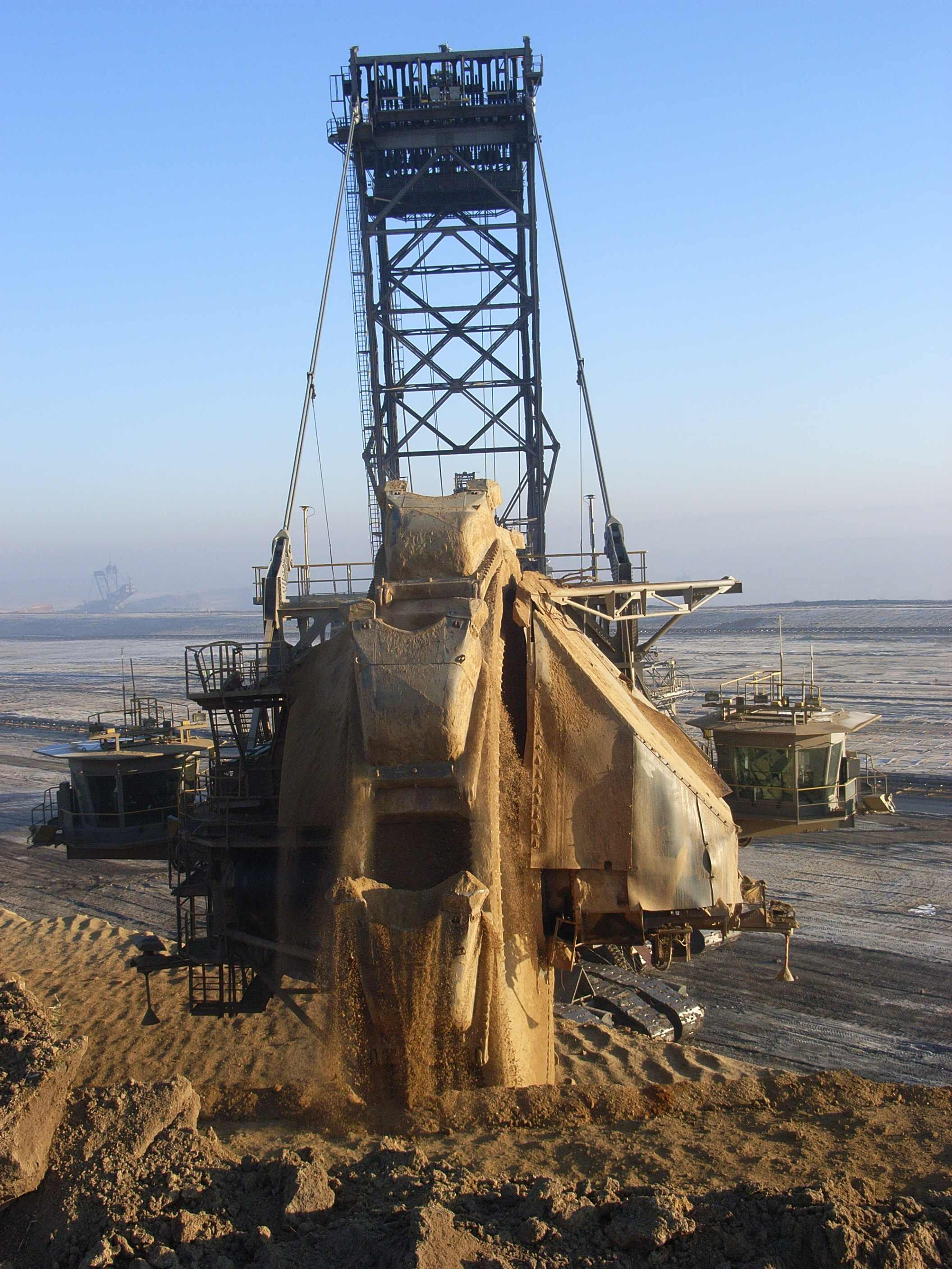 Schaufelradbagger Garzweiler II bei Spenrath (NRW)